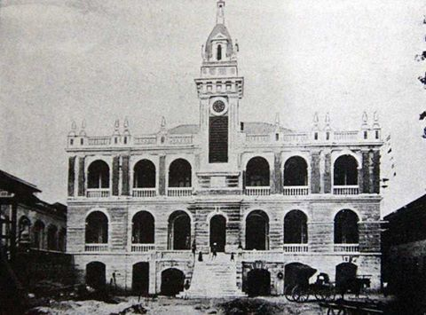 บ้านพระปรีชากลการตั้งอยู่เชิงสะพานพุทธ